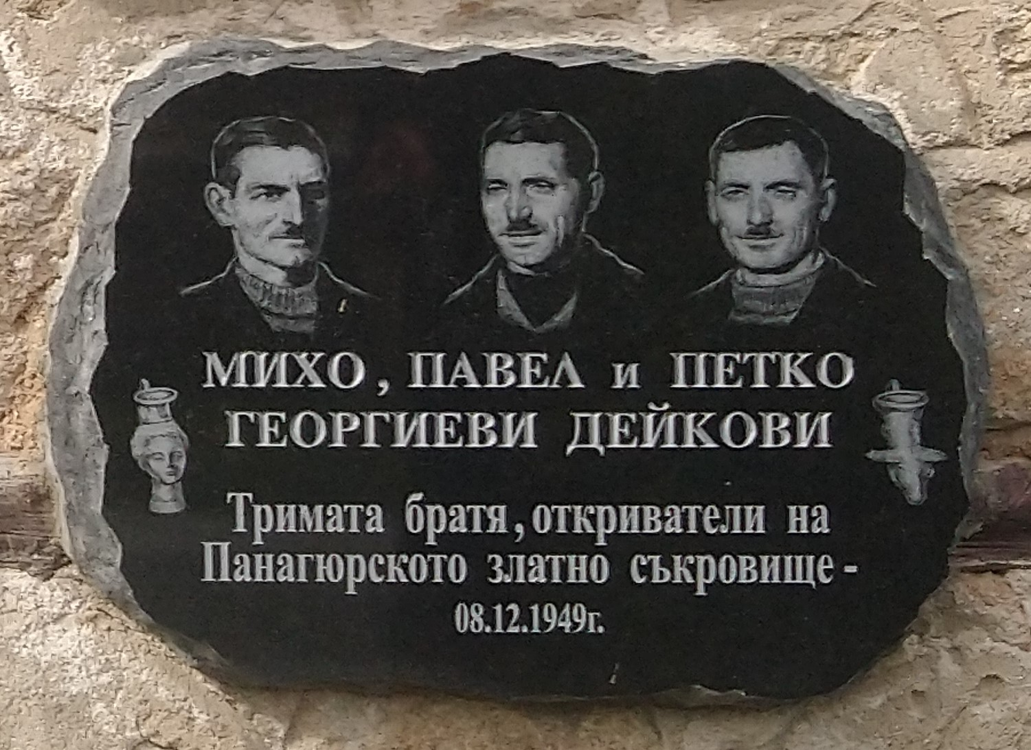 Братя Михо, Павел и Петко Георгиеви Дейкови - плоча в Исторически музей Панагюрище - Надпис: Тримата братя, откриватели на Панагюрското златно съкровище